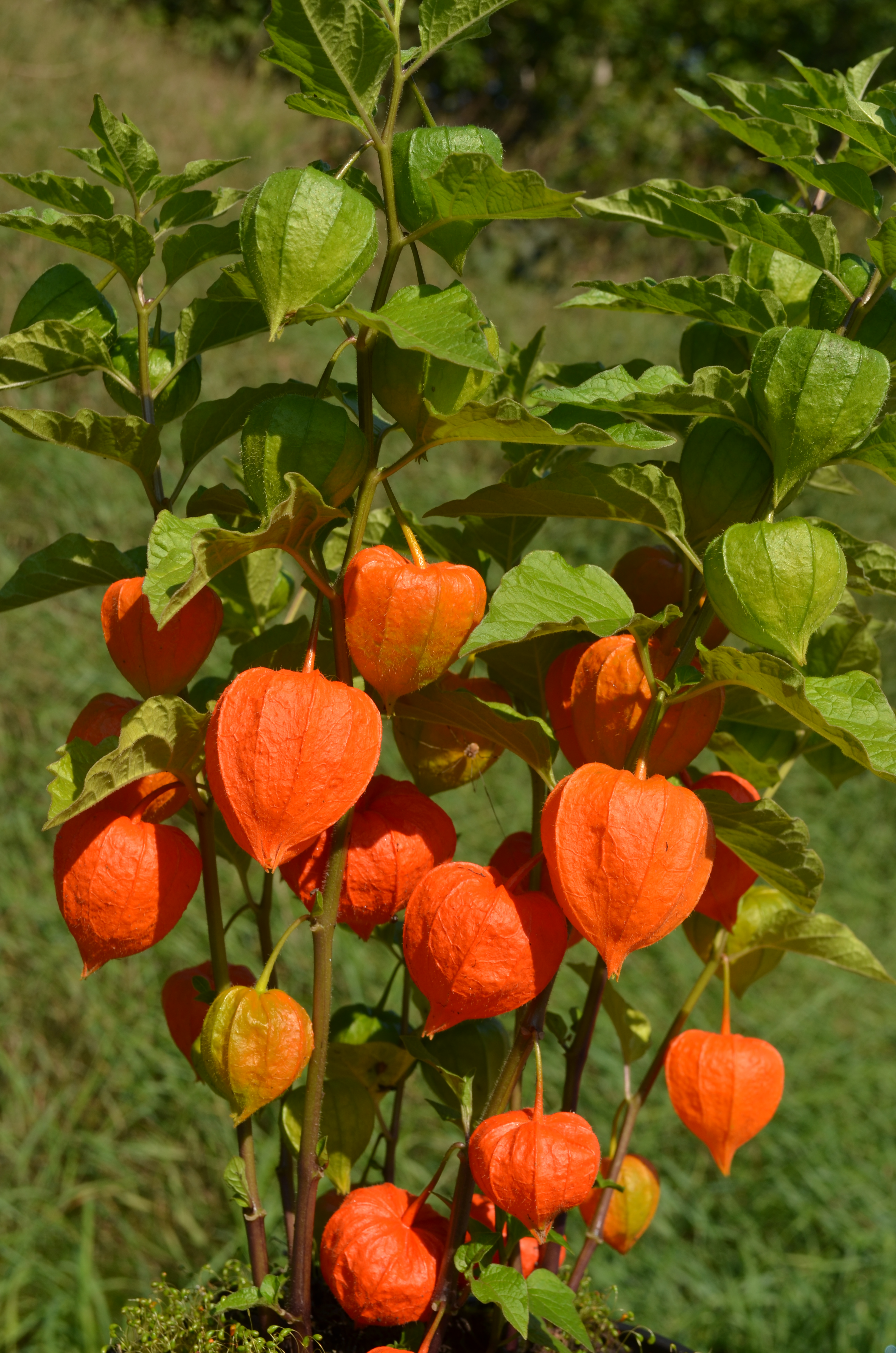 Lampionblume (Physalis alkekengi var franchetii), Pflanze mit Früchten